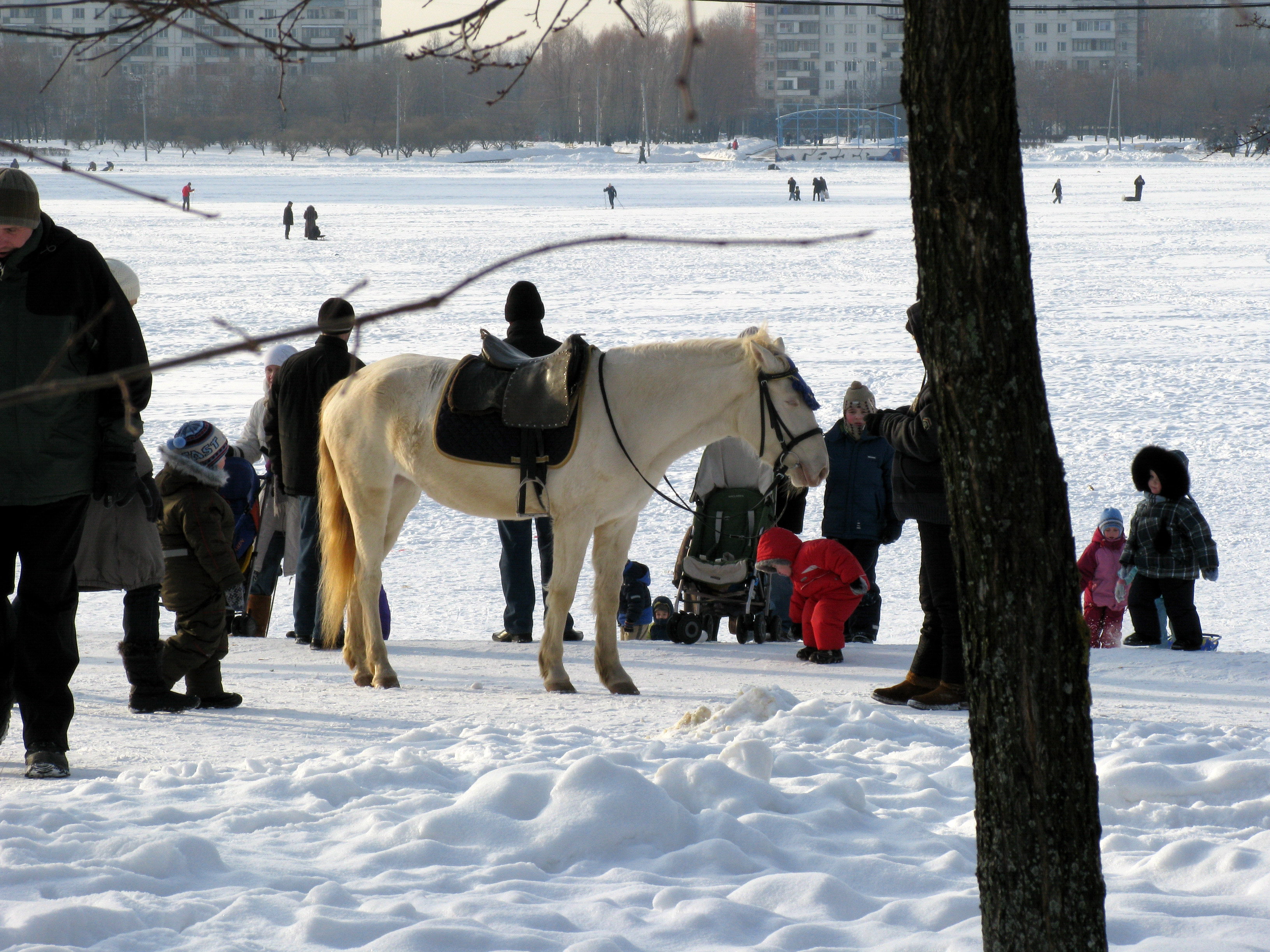 Гольяновский пруд и прилегающие территории